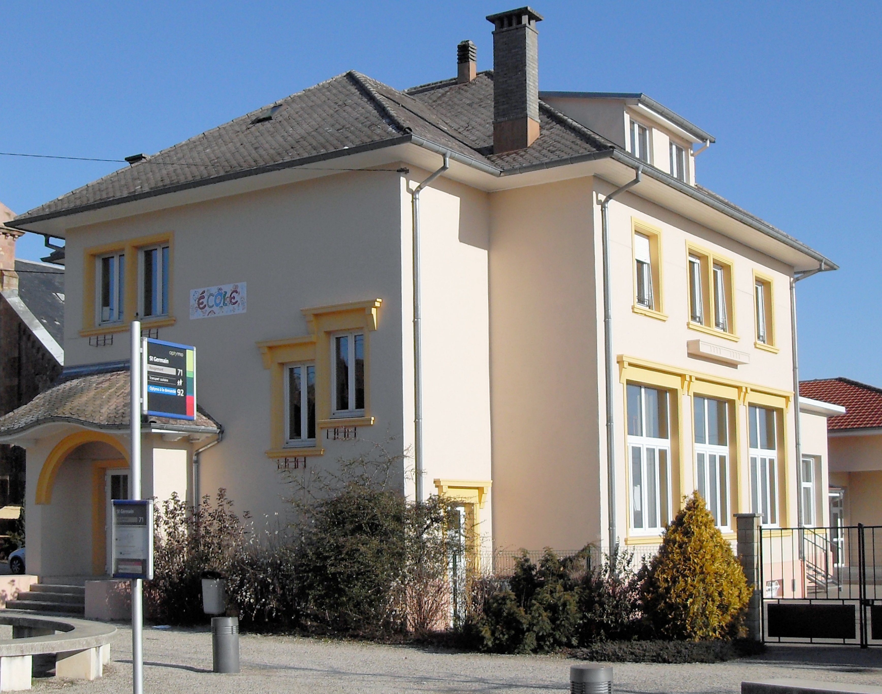 L'école primaire de Saint-Germain-le-Châtelet